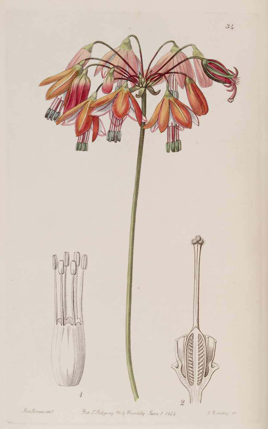 Bessera elegans